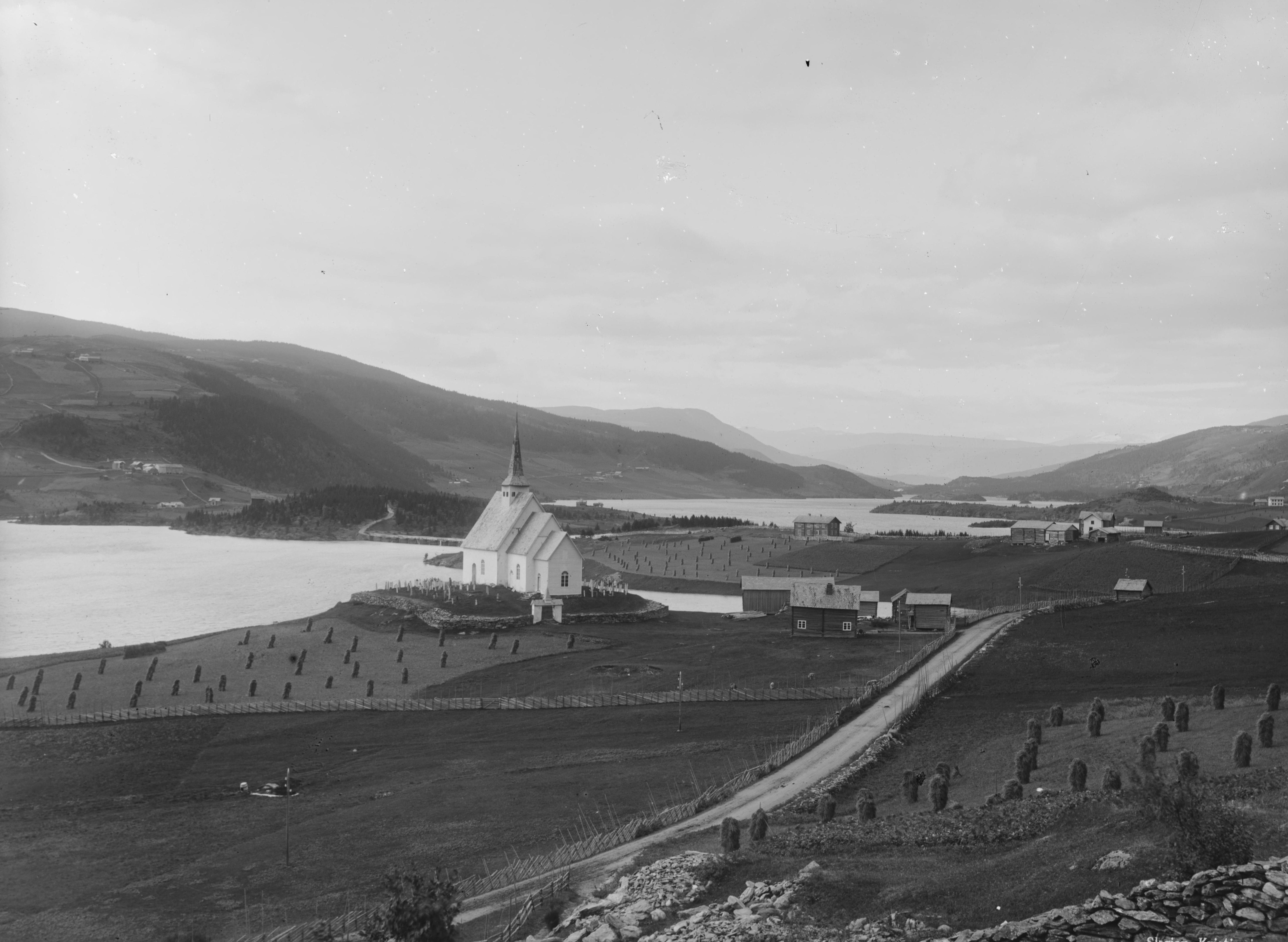 Påskrift negativ: No2177. Urnäs kirken Aurdal. Valders Skøien Kristiania Eneberettiget 1898. Påskrift negativ: 146 N.Aurdal [Riksantikvaren] Påskrift konvolutt: A-146 Ulnes kirke. N.Aurdal. Eksteriør [Riksantikvaren] [Negativet er eksponert med speilvendt resultat. Rettet opp.] Sted: Strondafjorden,Valdres Kommune: Nord-Aurdal Fylke: Oppland Tagger: Ulnes kirke landskap fjord åker kornstaur